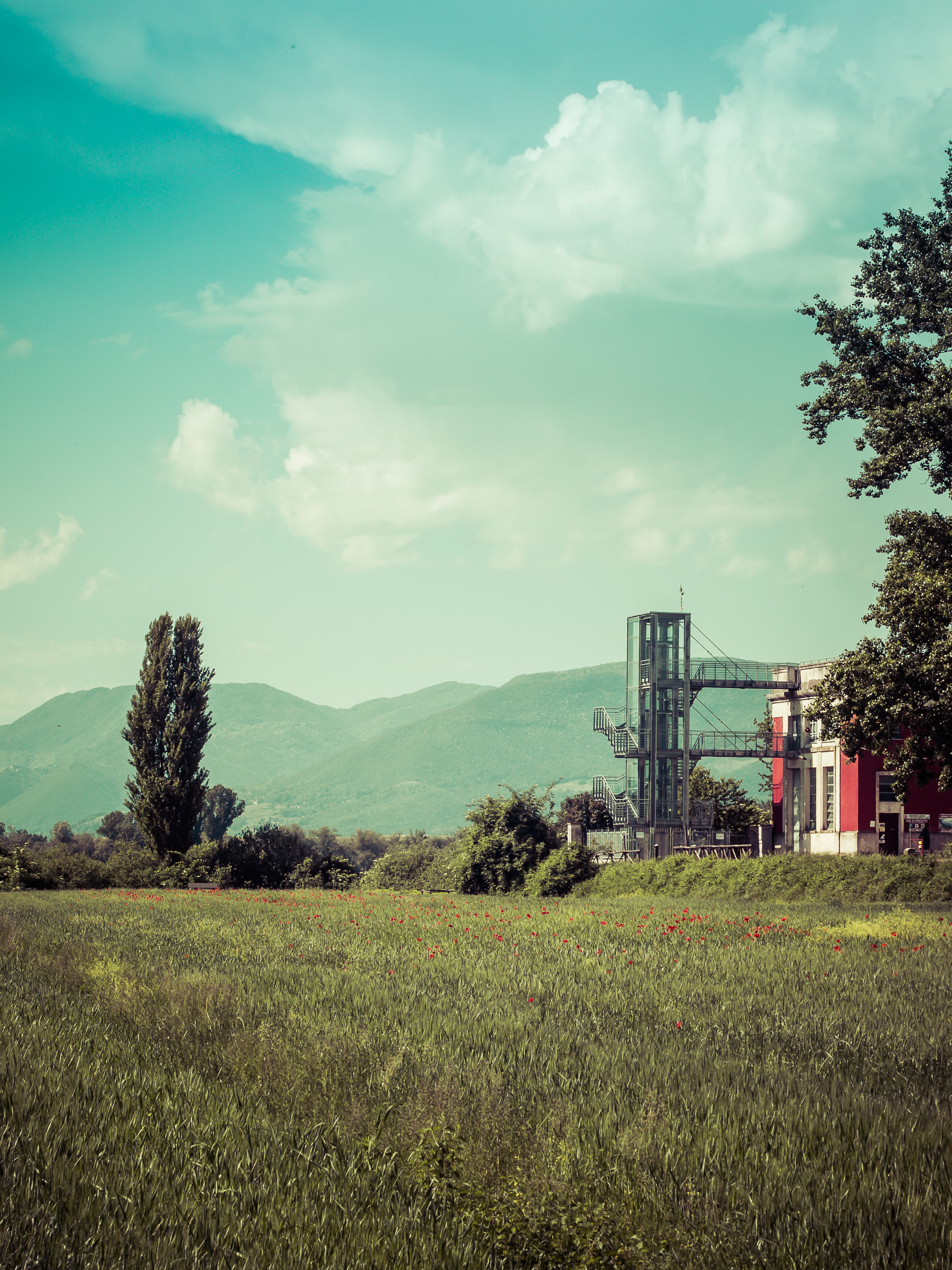 Riserva naturale Laghi Lungo e Ripasottile This is a photo of a monument which is part of cultural heritage of Italy.